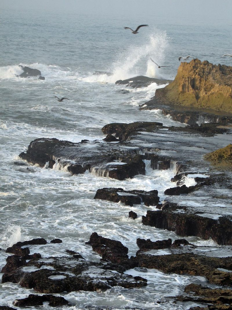 Atlanto vandenyno pakrantė ties Es Savira. Marokas